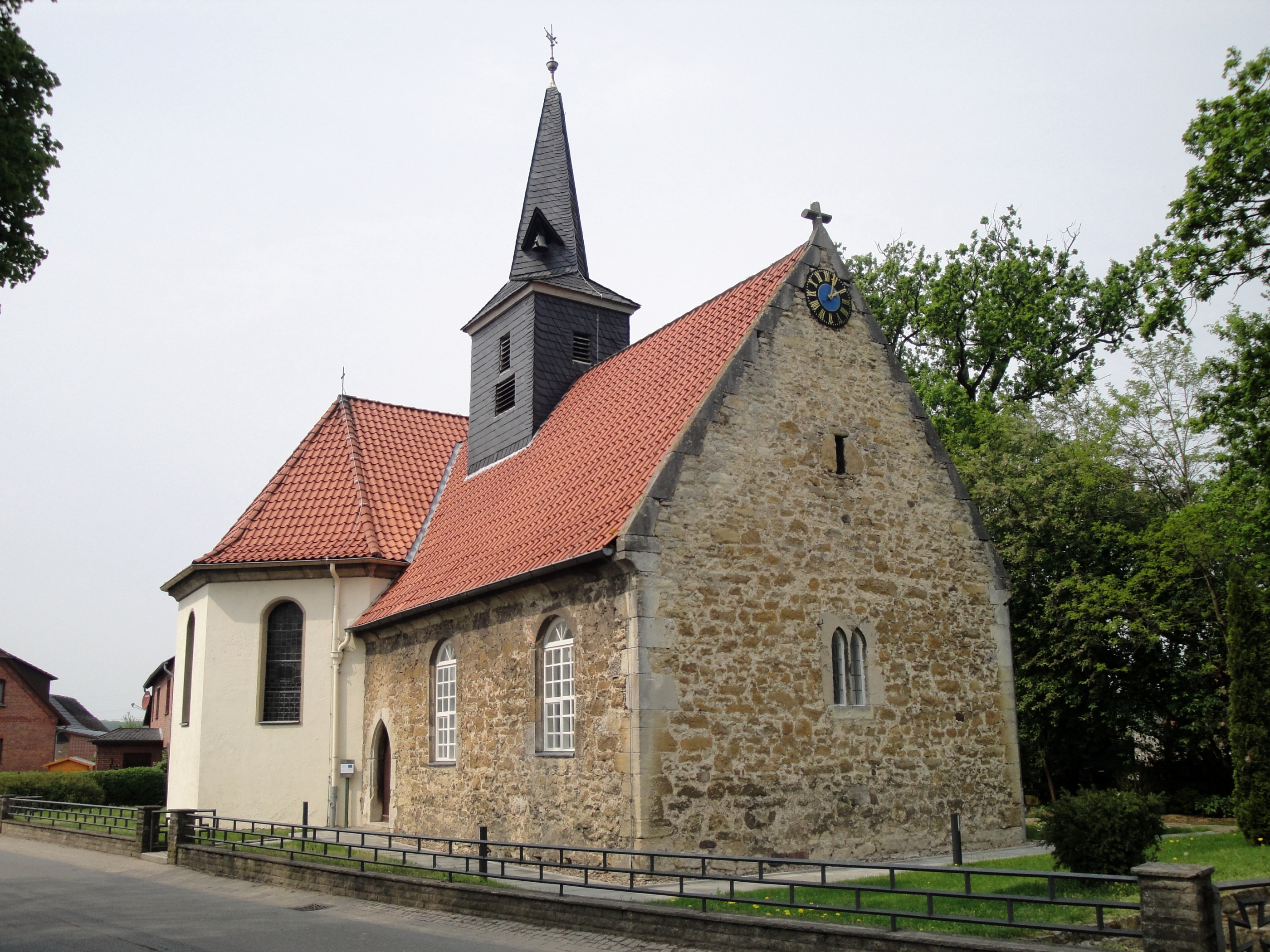 Evangelisch-lutherische Kirche in Rötgesbüttel